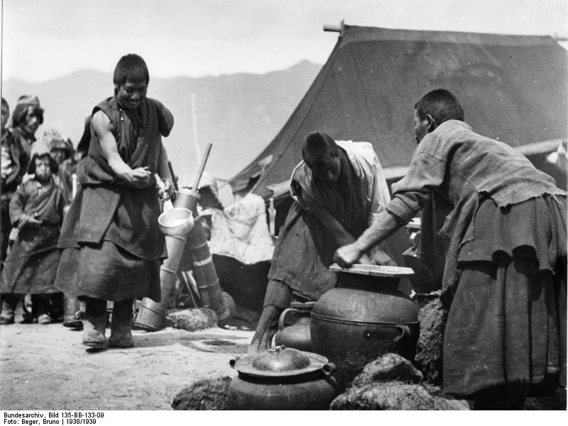 Lhasa, Feldküche